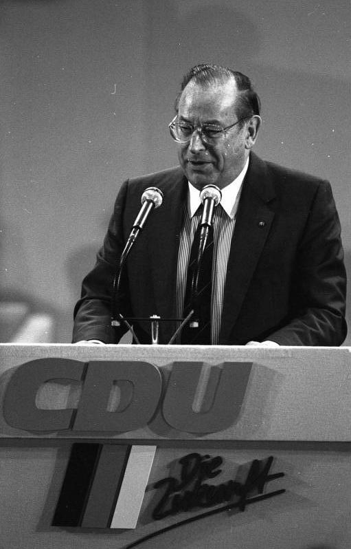 9.11.1987 35. Bundesparteitag der CDU in der Beethovenhalle, Bonn.